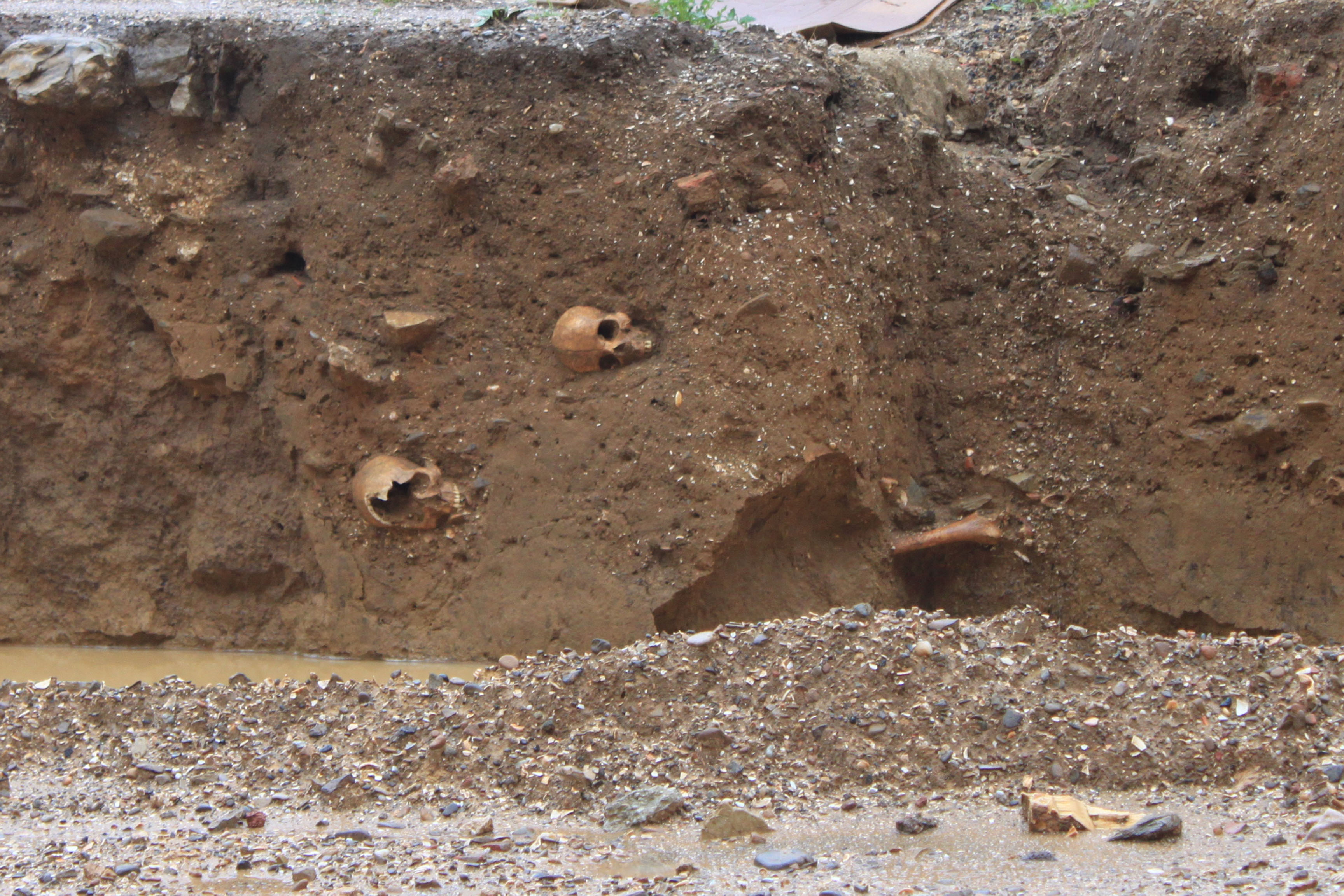 Restos humanos pertenecientes a dos enterramientos aparecidos en la excavación del cementerio andalusí de la Puerta del Fonsario de Algeciras (Andalucía, España) durante las catas llevadas a cabo en 2011 previas a la construcción de la nueva Biblioteca municipal.